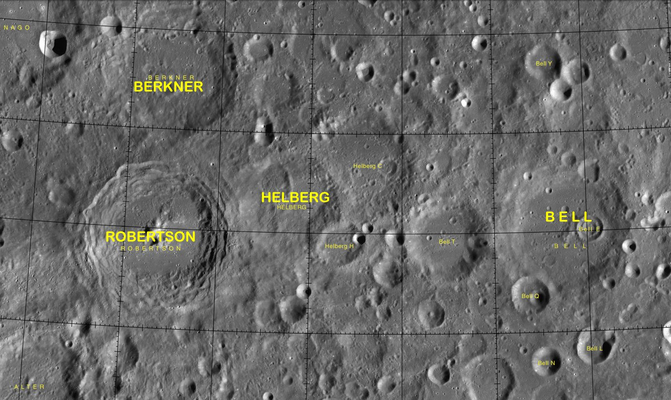 Cráter lunar Helber. (Imagen LRO)